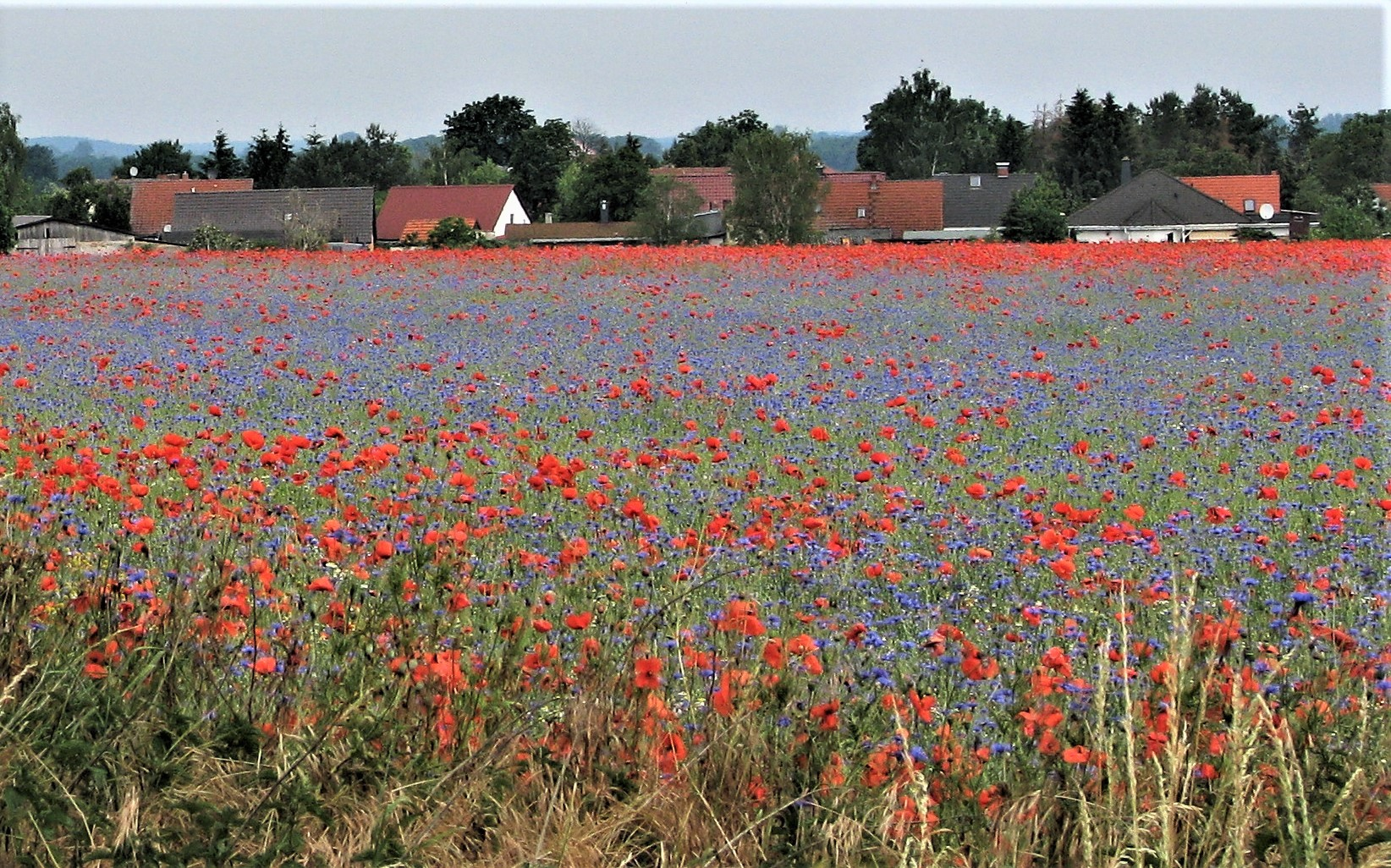 Frühsommerlicher Blick über die Feldmark von Süden nach Barnewitz im Juni 2019